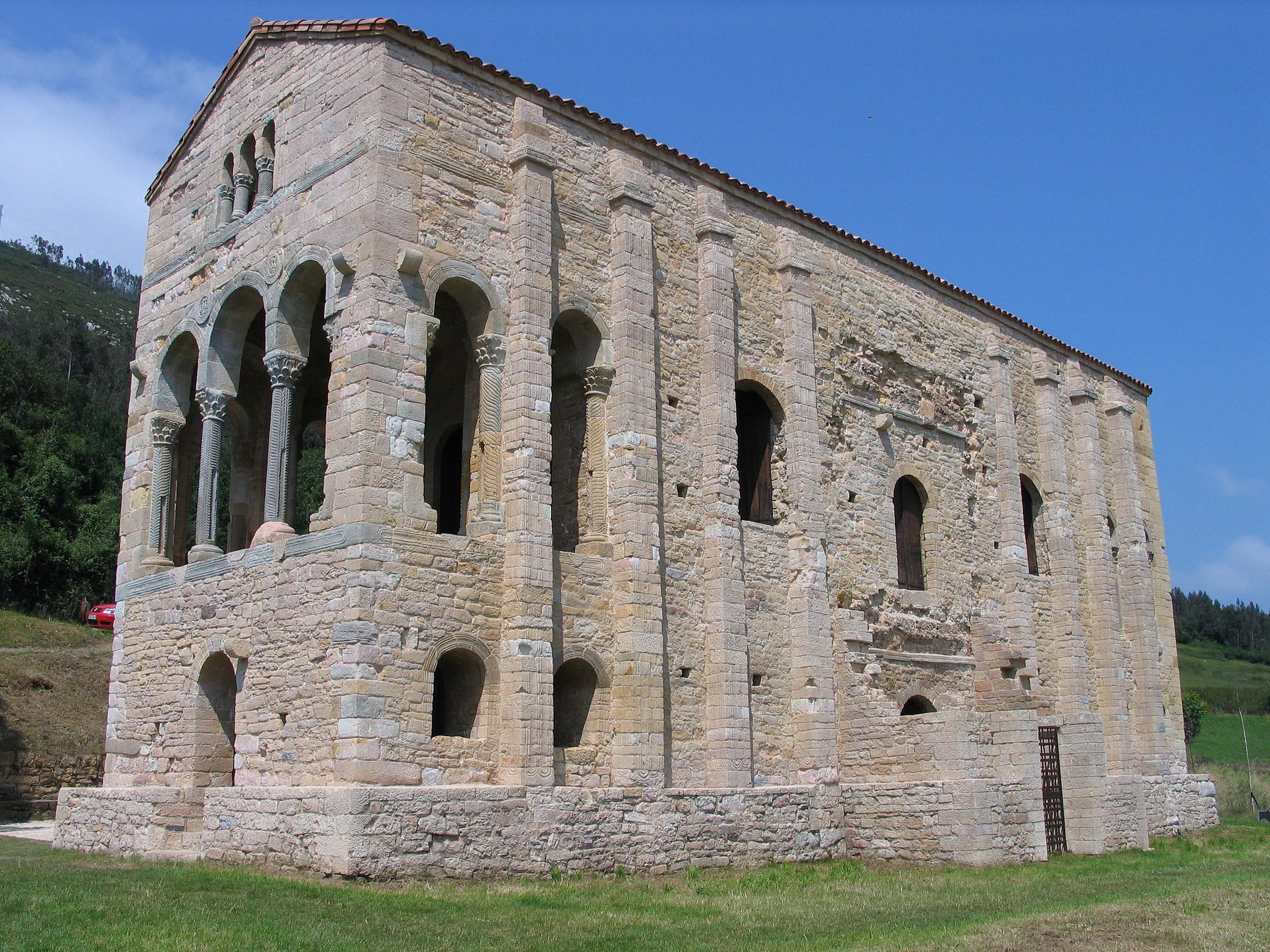 Santa María del Naranco, Oviedo Photograph: Luidger (30. Juni 2006)